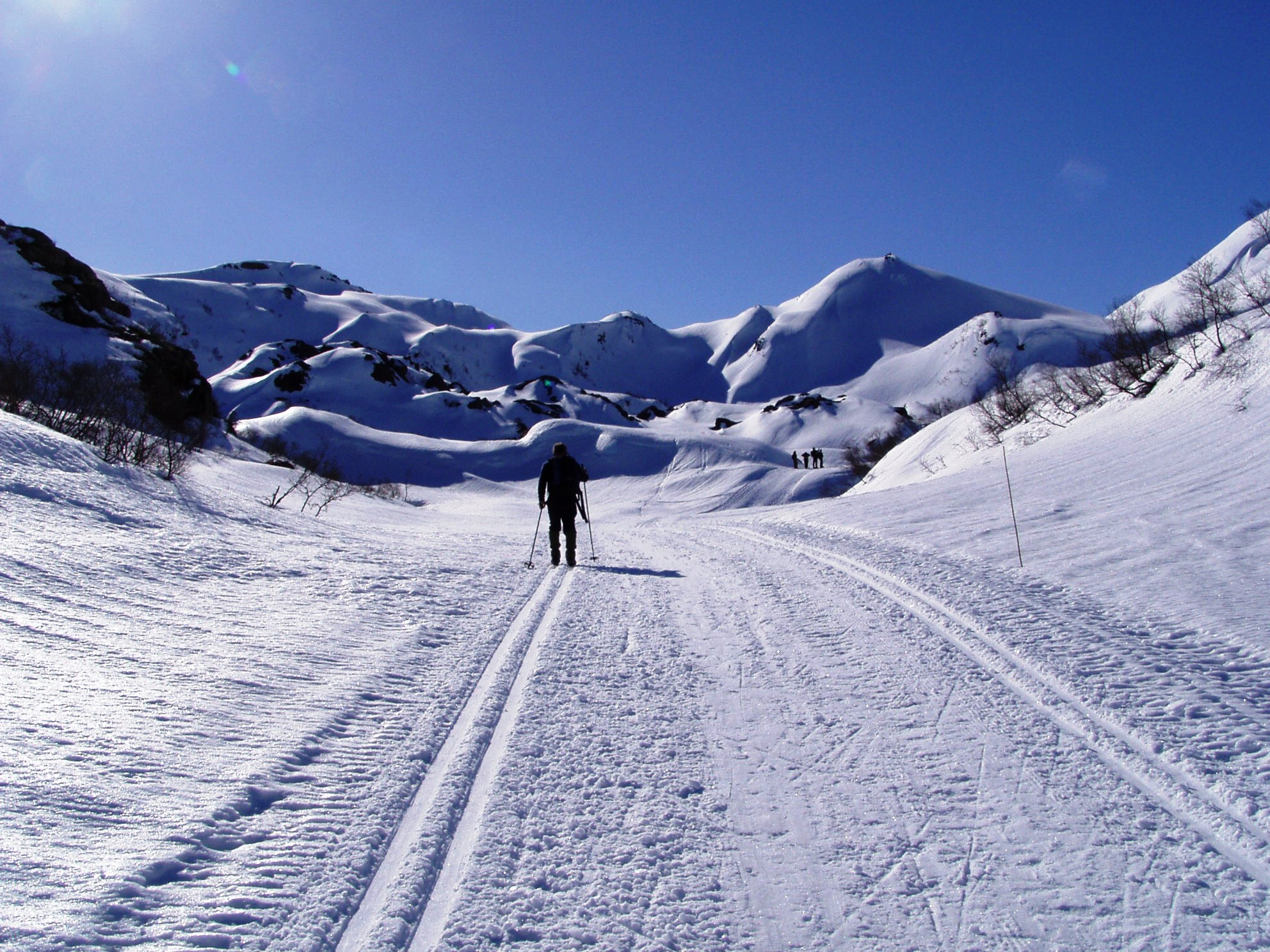 Kvamskogen, Bergens skieldrado Norway.